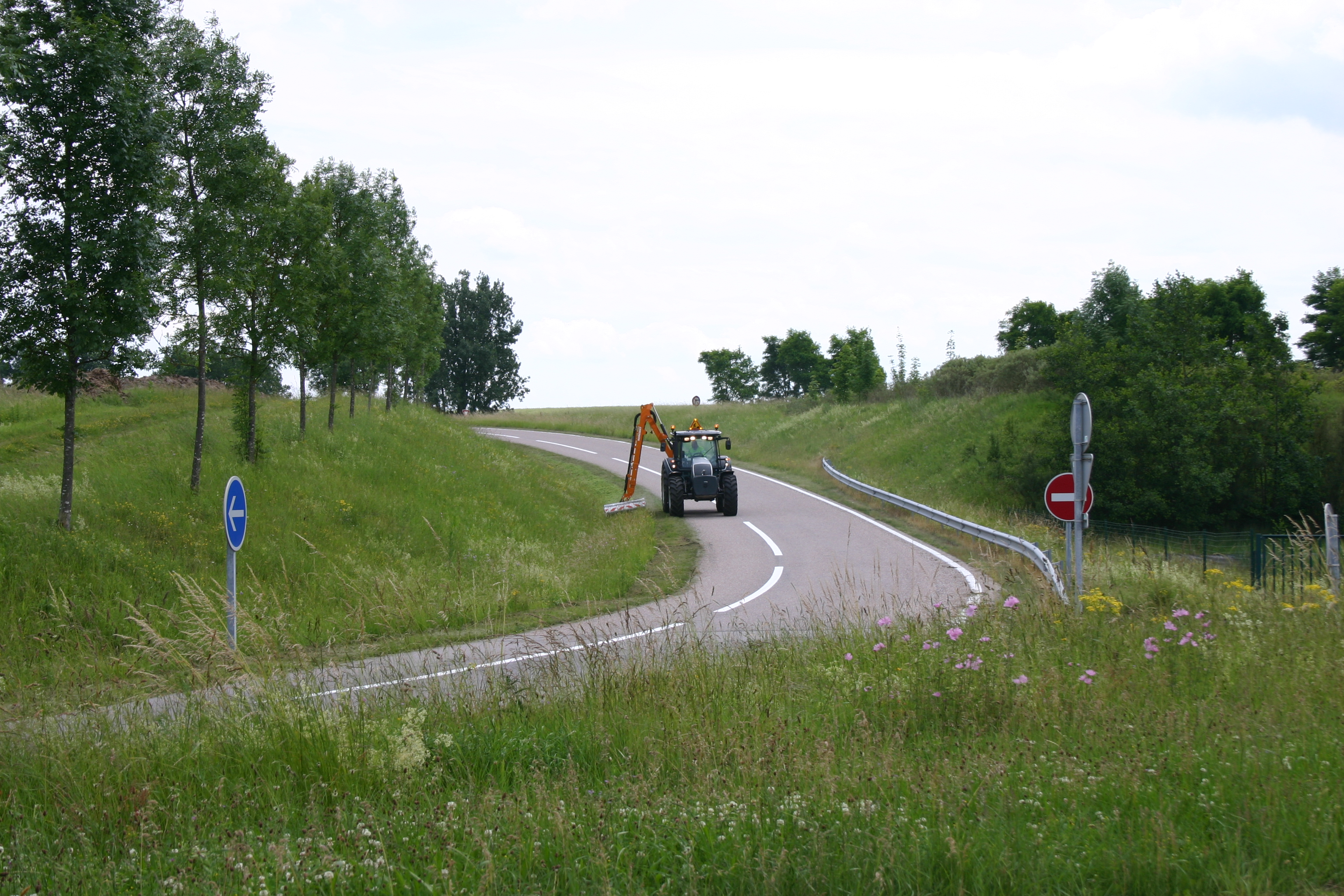 Épareuse